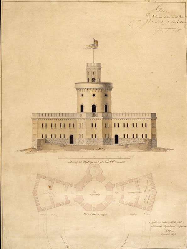 Ritning till nybyggnad på Kastellholmen. Elevation mot söder. Påtecknad av G. Jungmarker 30 April 1846. Akvarell av Fredrik Blom. Beteckning: Inventarienummer SSM 500539